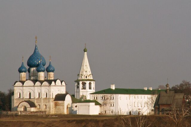 Суздальский кремль